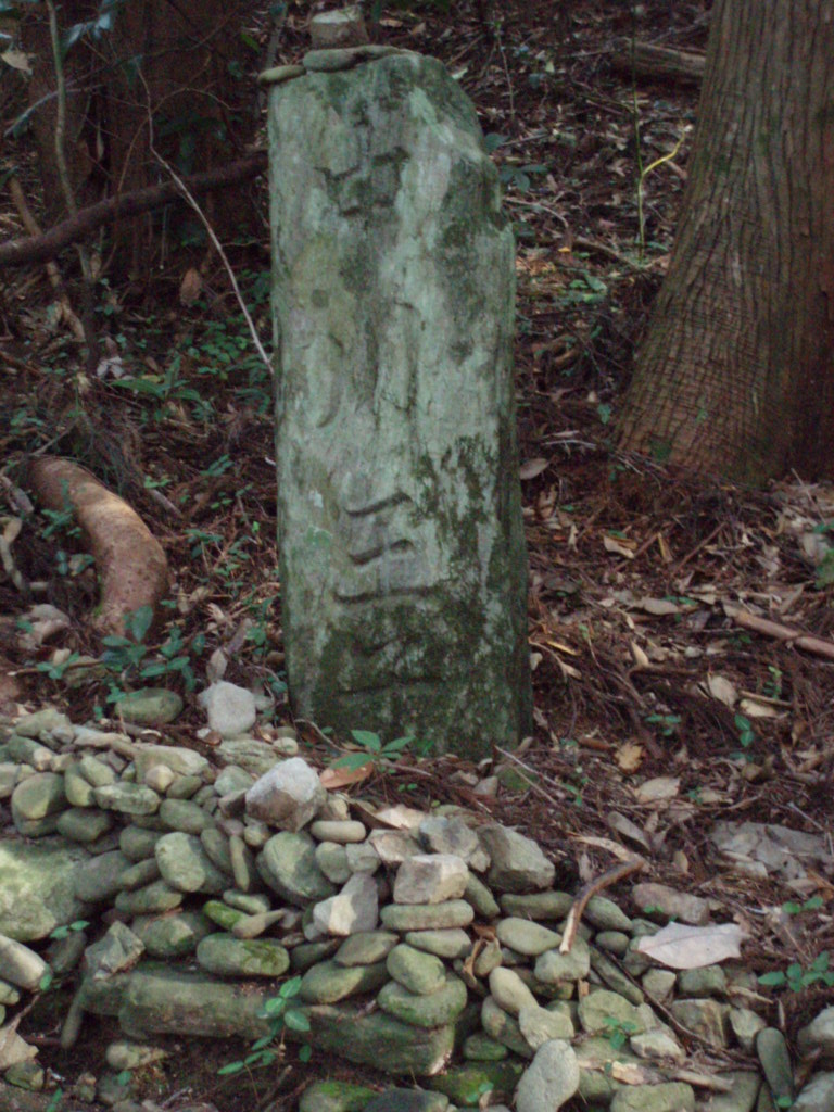 Monument_NAKANOKAWA-oji_remains